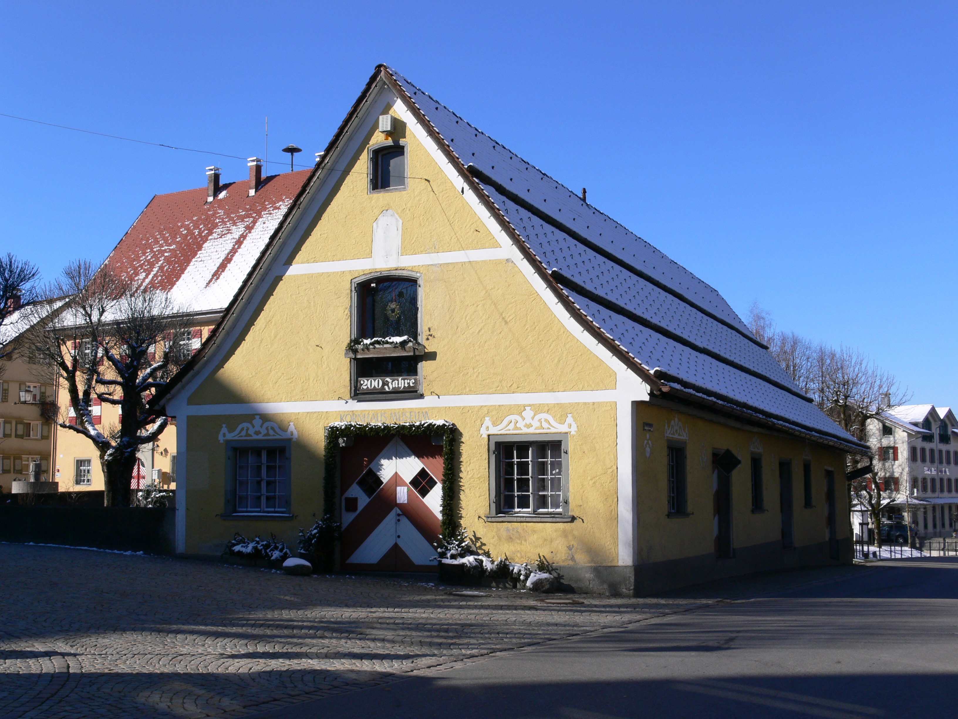 Kornhausmuseum Weiler, Hauptstraße 13, Marktgemeinde Weiler-Simmerberg, Landkreis Lindau, Bayern. Der unter Denkmalschutz stehende eingeschossige Satteldachbau kragt südlich über den Hausbach vor. Das Gebäude wurde das 1791 nach einer Hungersnot errichtet und in den 1930er Jahren von Baumeister Georg Bufler renoviert